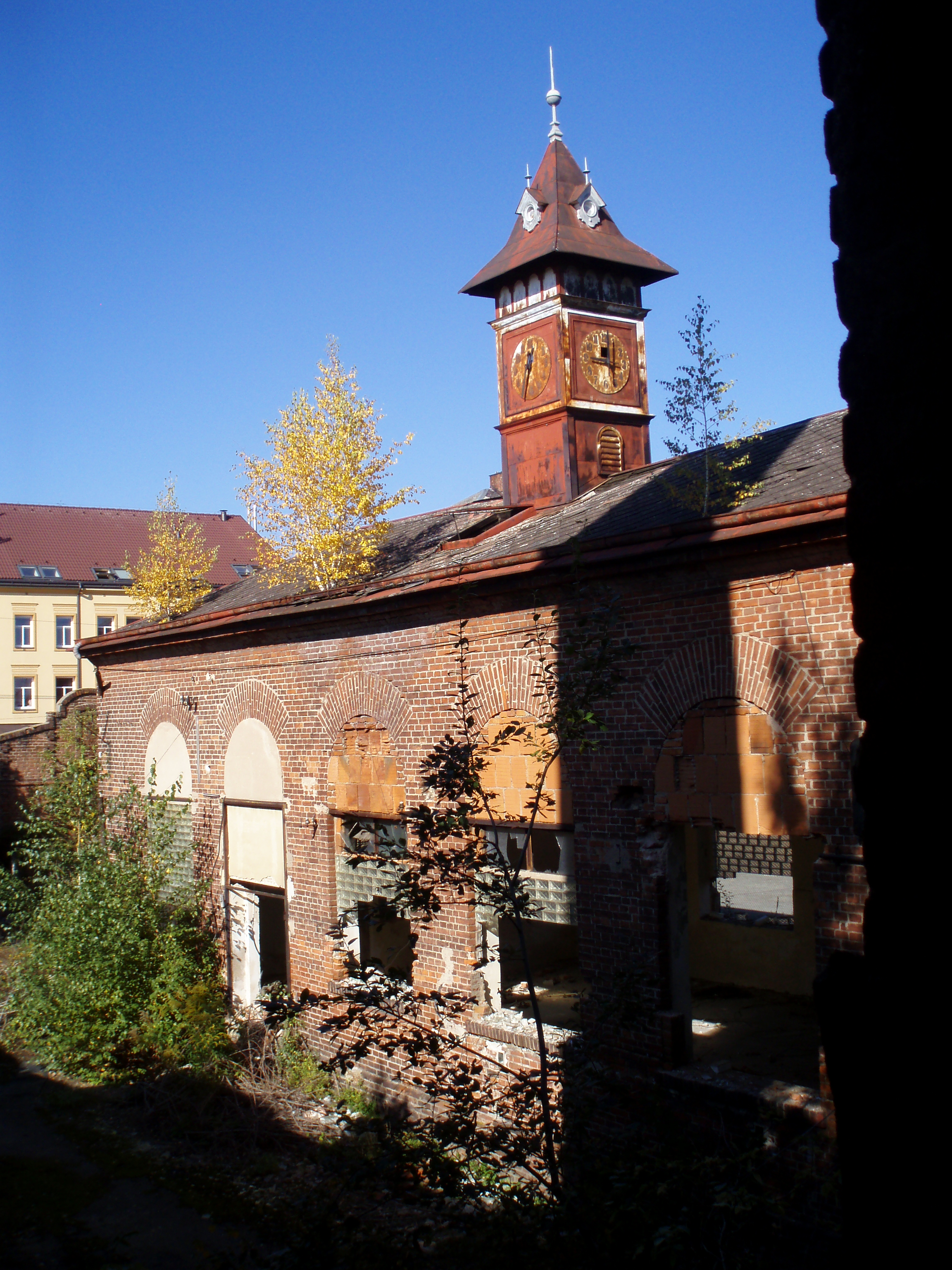 Kuklenská koželužna